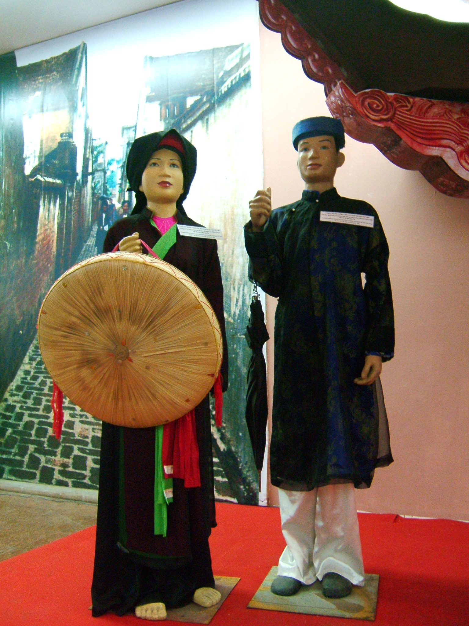 Trang phục toàn thân của người quan họ nam và người quan họ nữ. Ảnh chụp tại Triển lãm Vân Hồ, Hà Nội